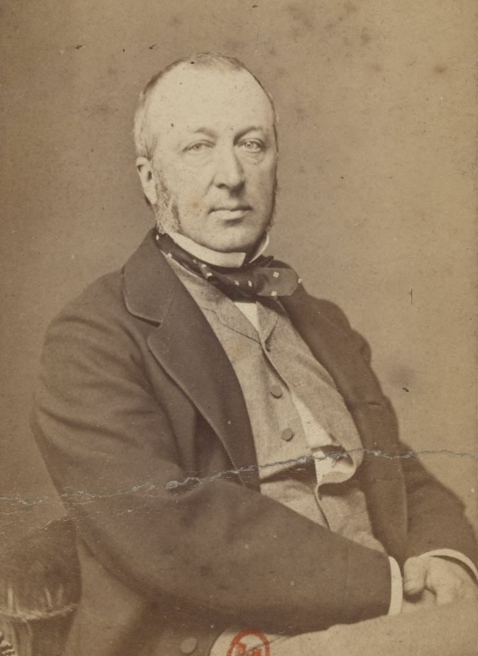 Gaston d'Audiffret-Pasquier, Recueil de Célébrités du XIXe siècle